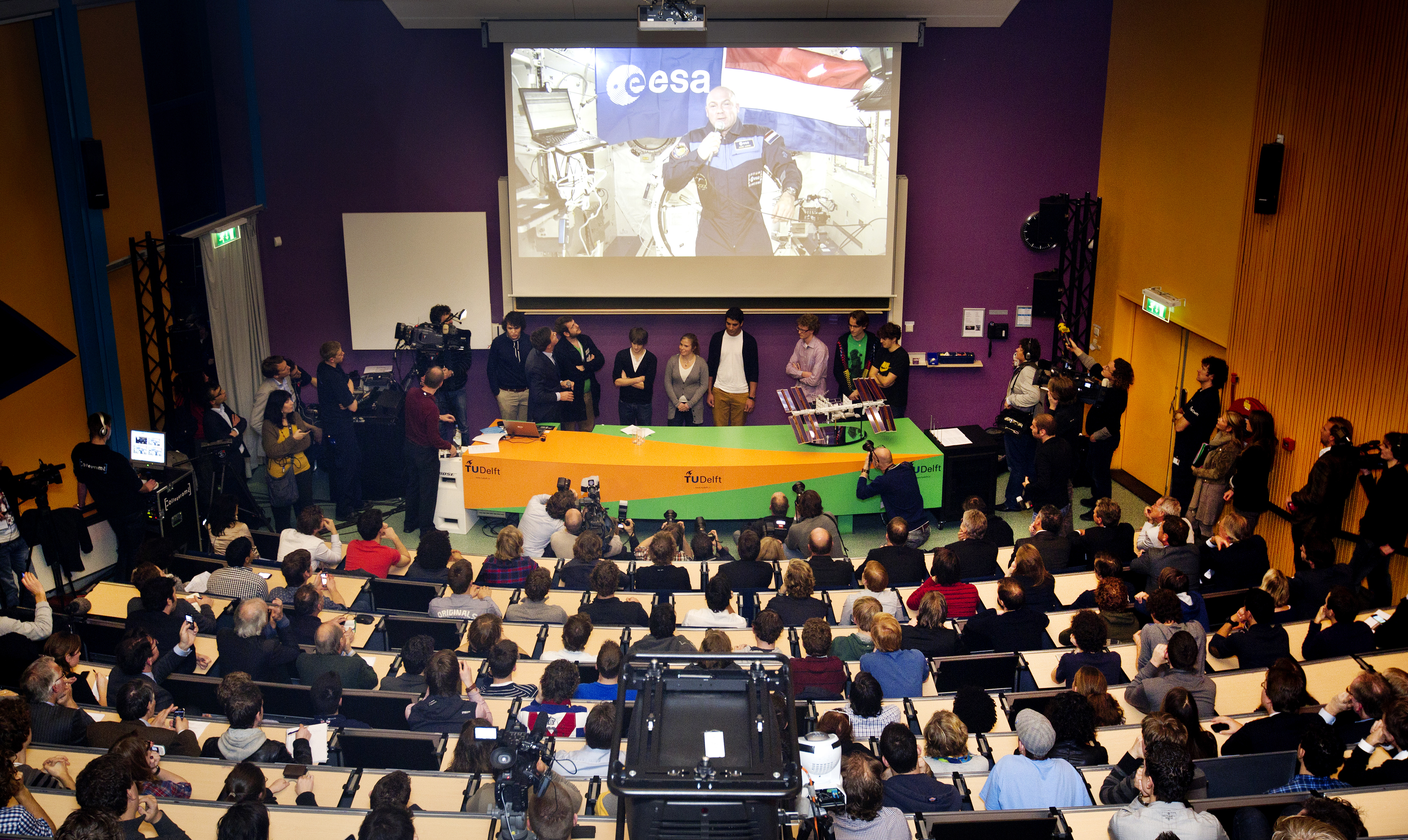 Minister-president Rutte spreekt samen met studenten van de TU Delft via een live videoverbinding met astronaut André Kuipers. De videoverbinding met het internationale ruimtestation ISS vindt plaats op de faculteit Luchtvaart- en Ruimtevaarttechniek van de TU Delft. André Kuipers is sinds 21 december voor ruim vijf maanden in de ruimte om te wonen en werken in het internationale ruimtestation ISS.